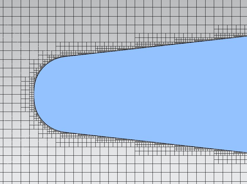 Kartesisches Netz eines umströmten Körpers